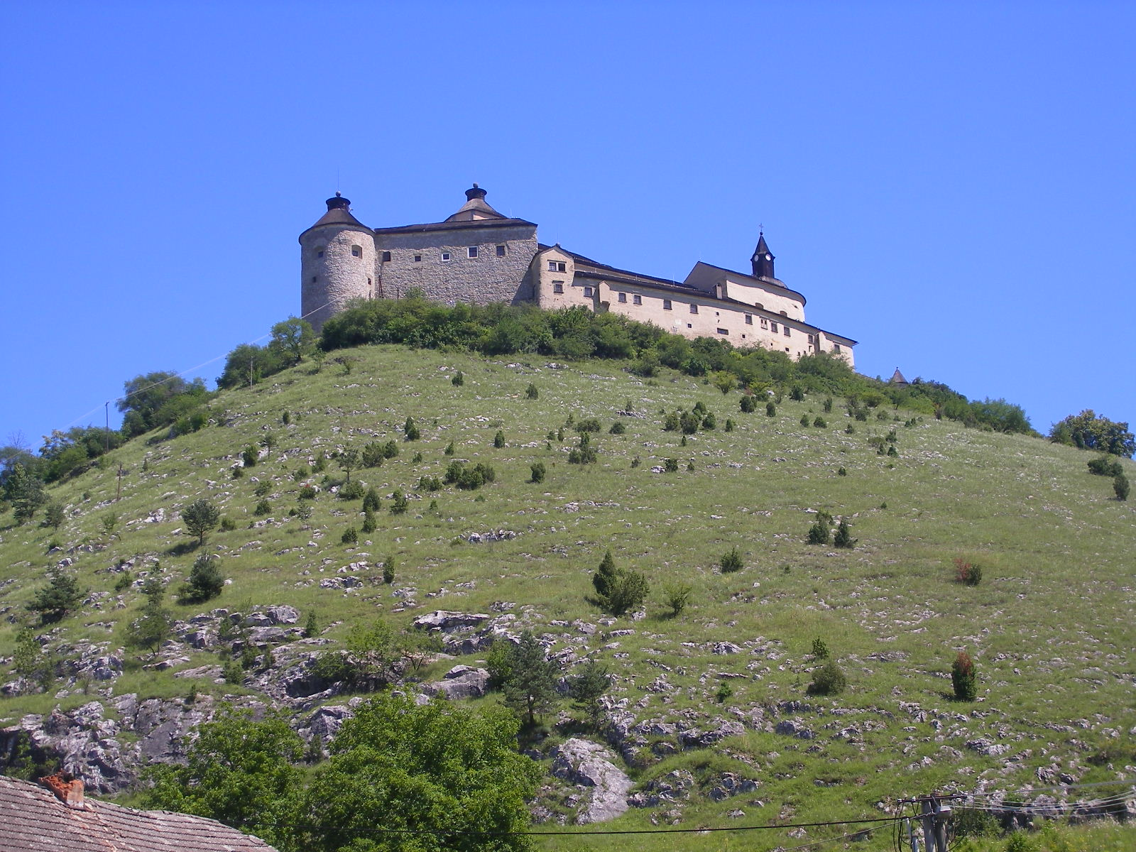 Krasznahorkaváralja - Krasznahorka vára